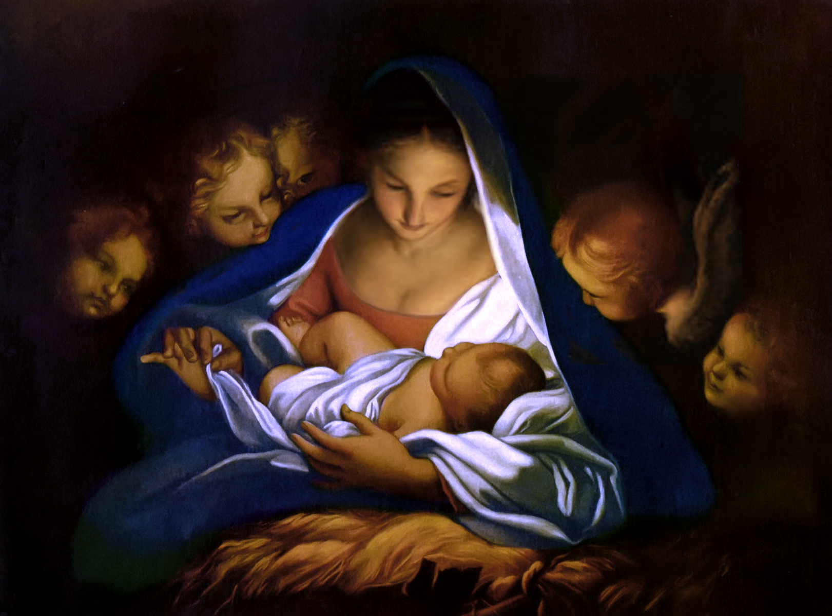 scansione di foto riproducente il dipinto di Carlo Maratta Natività (Roma, San giuseppe dei falegnami)